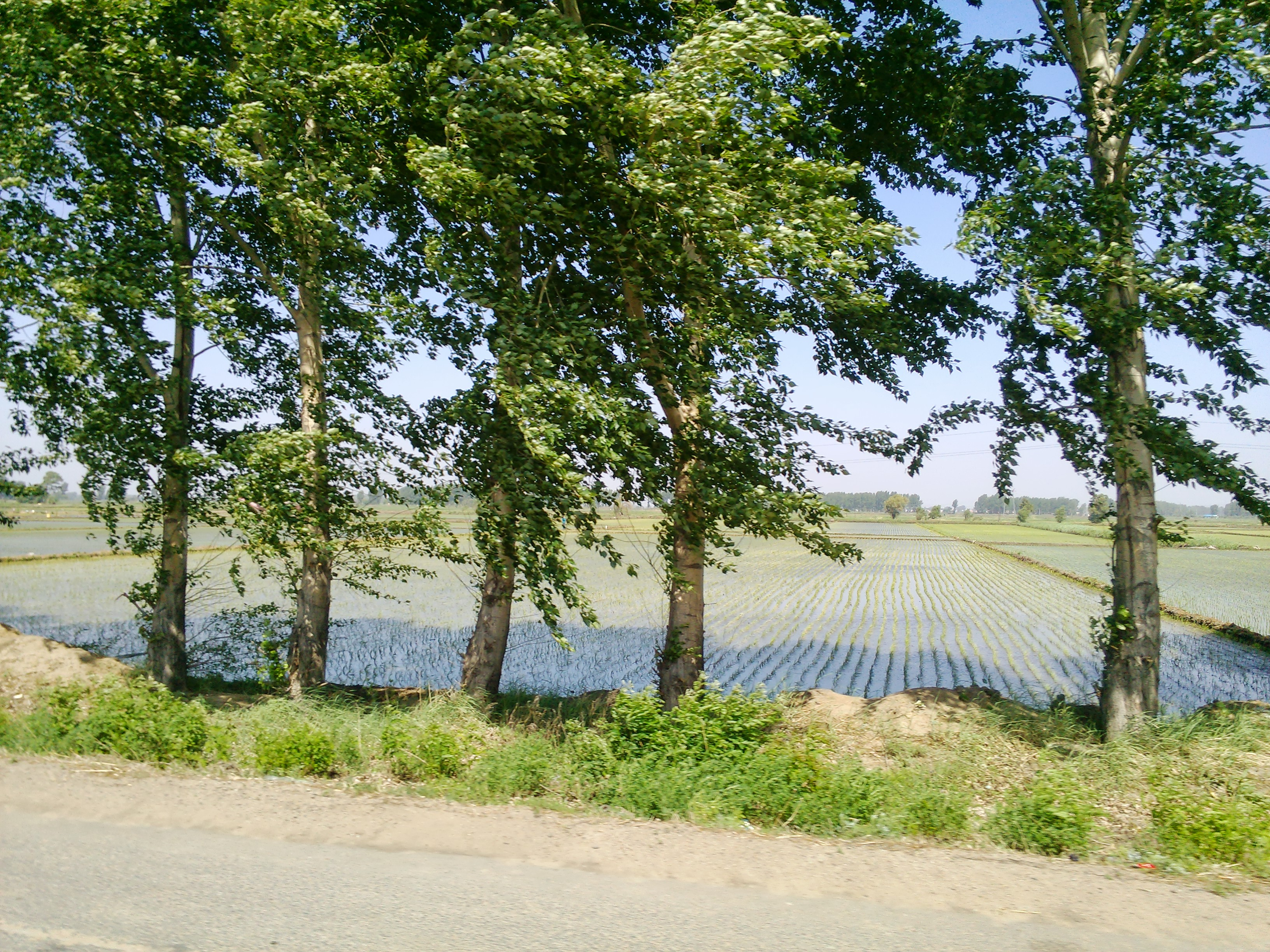 Qian Gorlos, Songyuan, Jilin, China